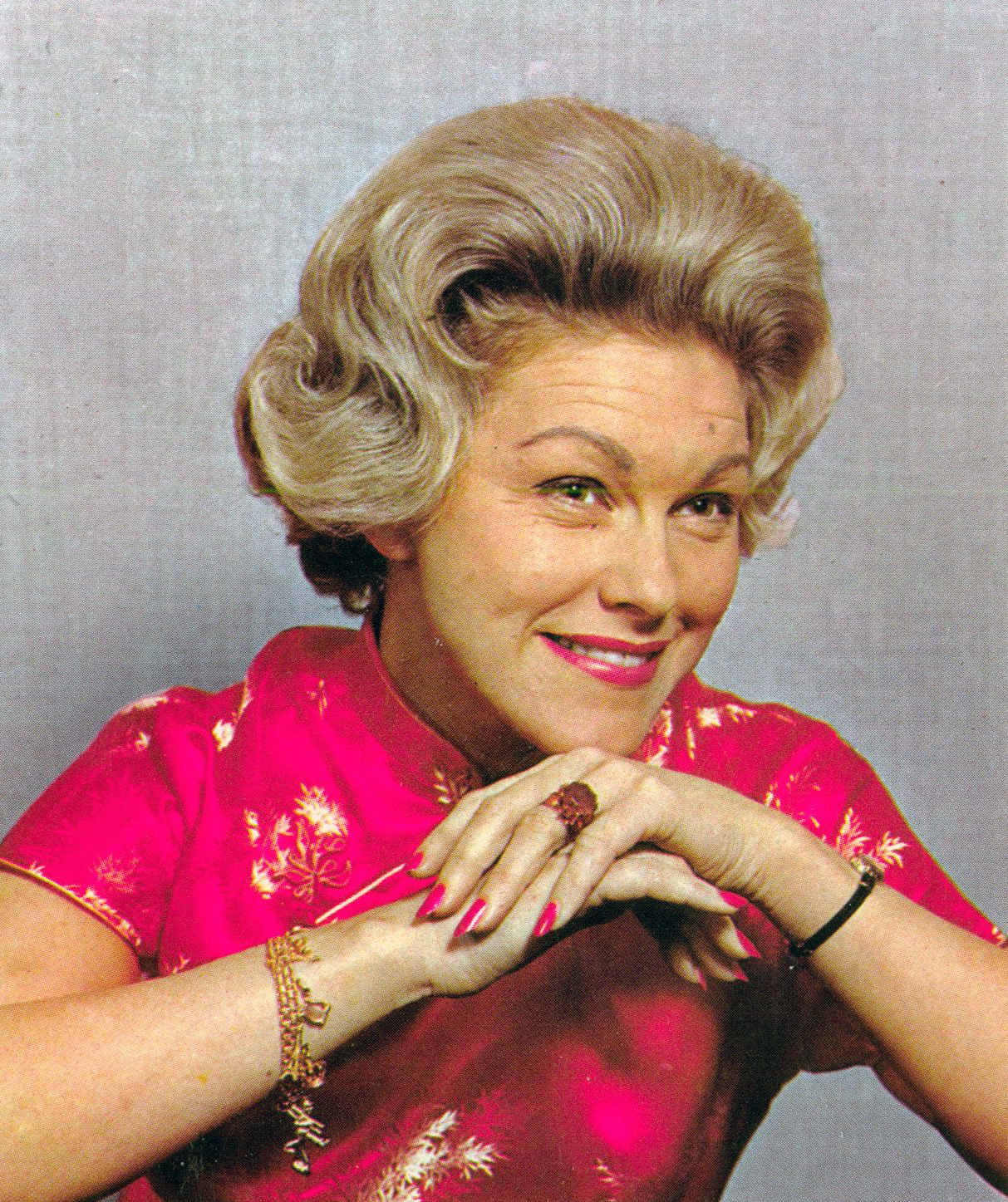 Berith Bohm